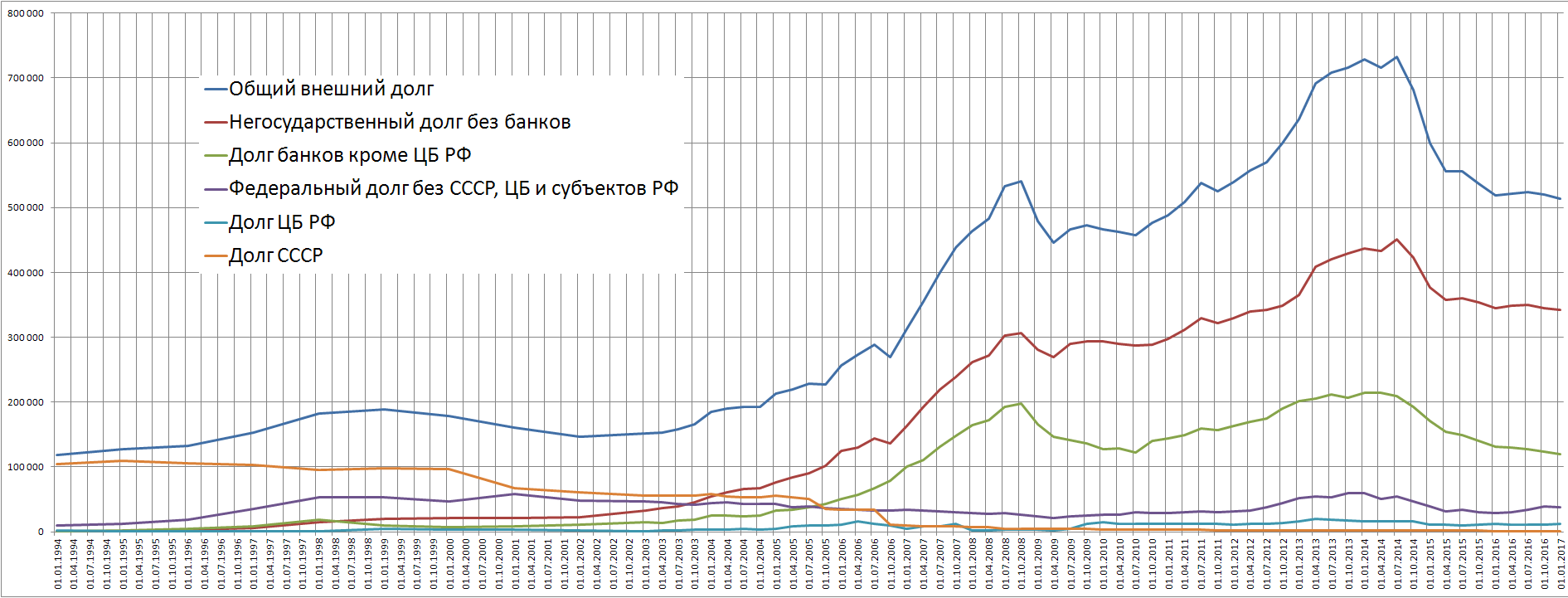 Внешний долг РФ 04 2017